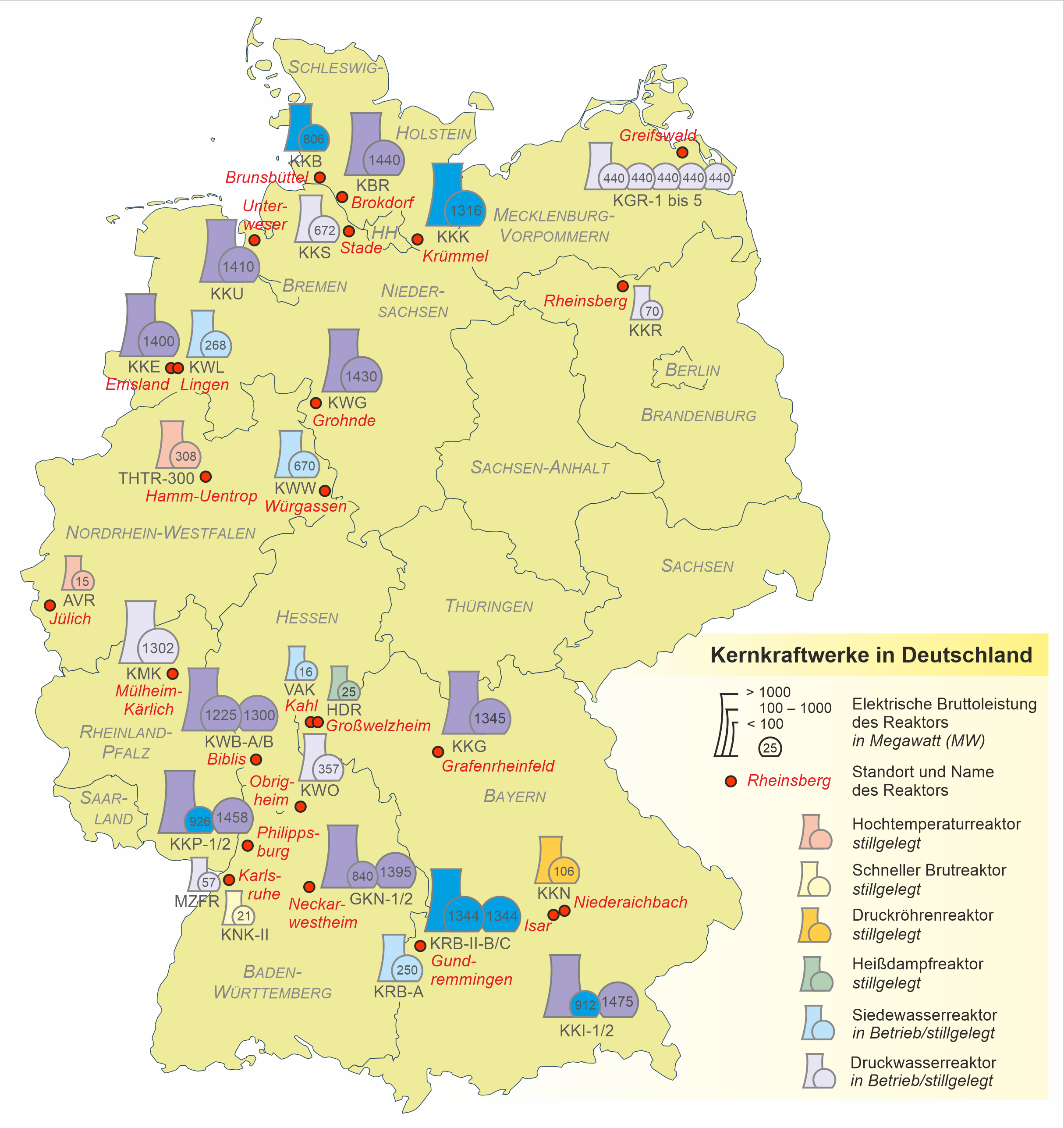 Kernkraftwerke in Deutschland, Stand nach dem Atomkonsens vom 30.6.2011